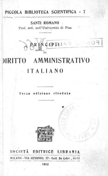 Frontespizio